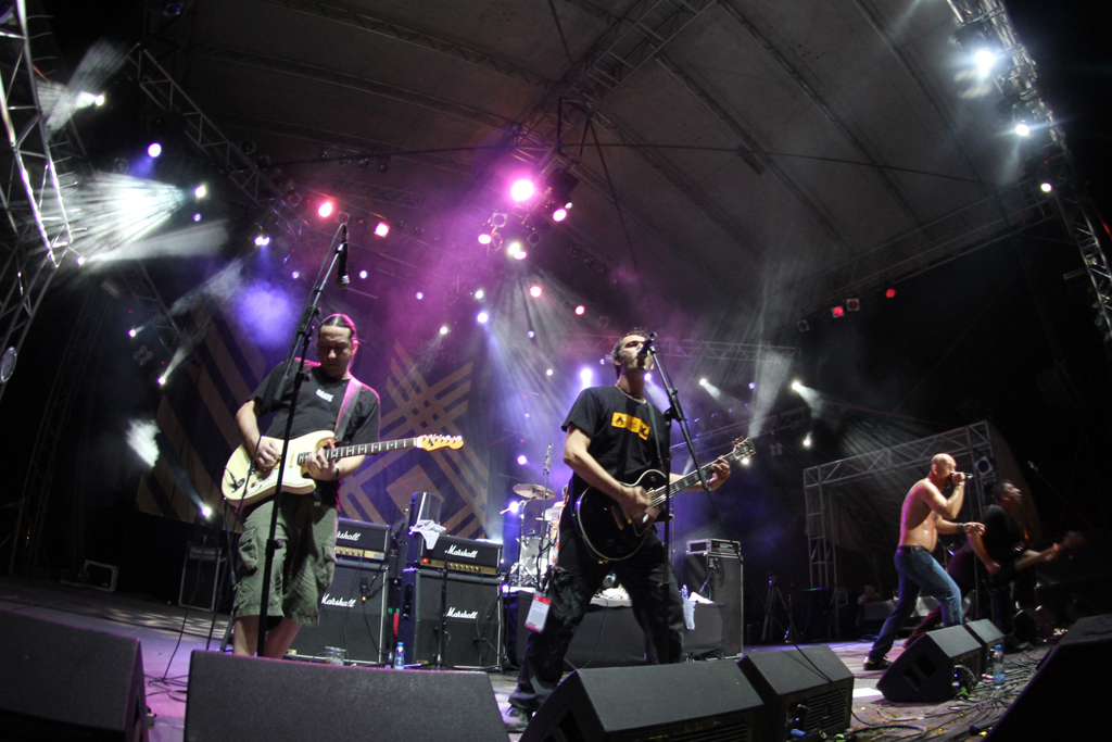 Grupa Goblini na festivalu Egzit 2012.